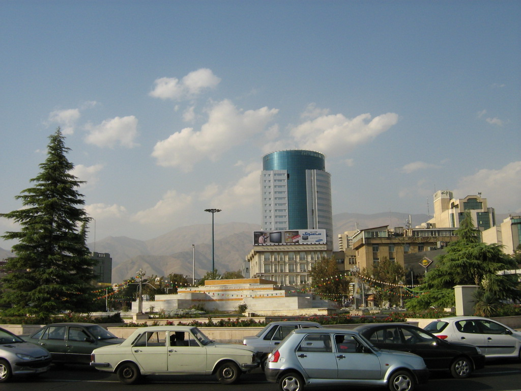 Vanak square